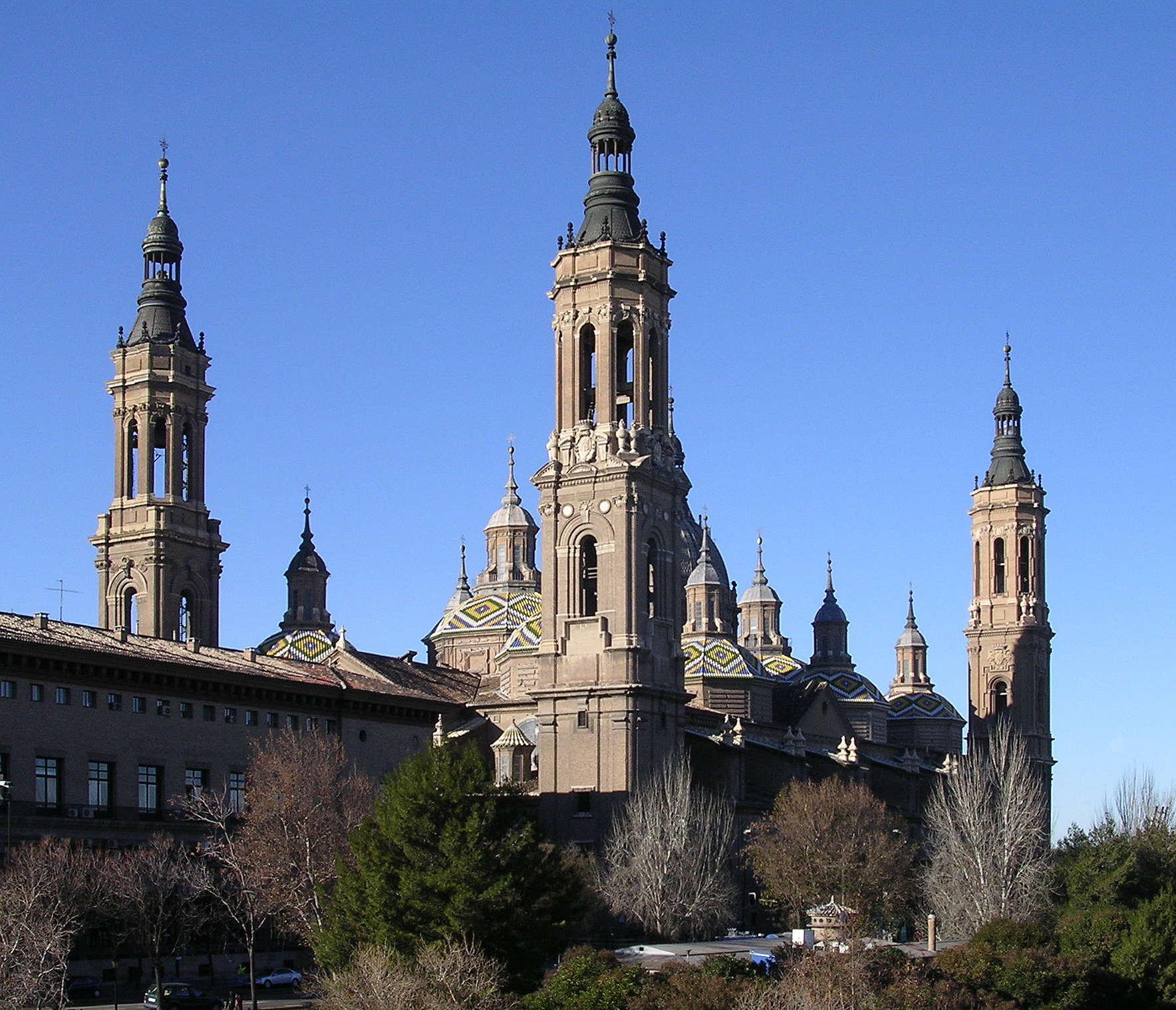 Basílica de Nuestrs/a Señora del Pilar en Zaragoza (Aragón,España)